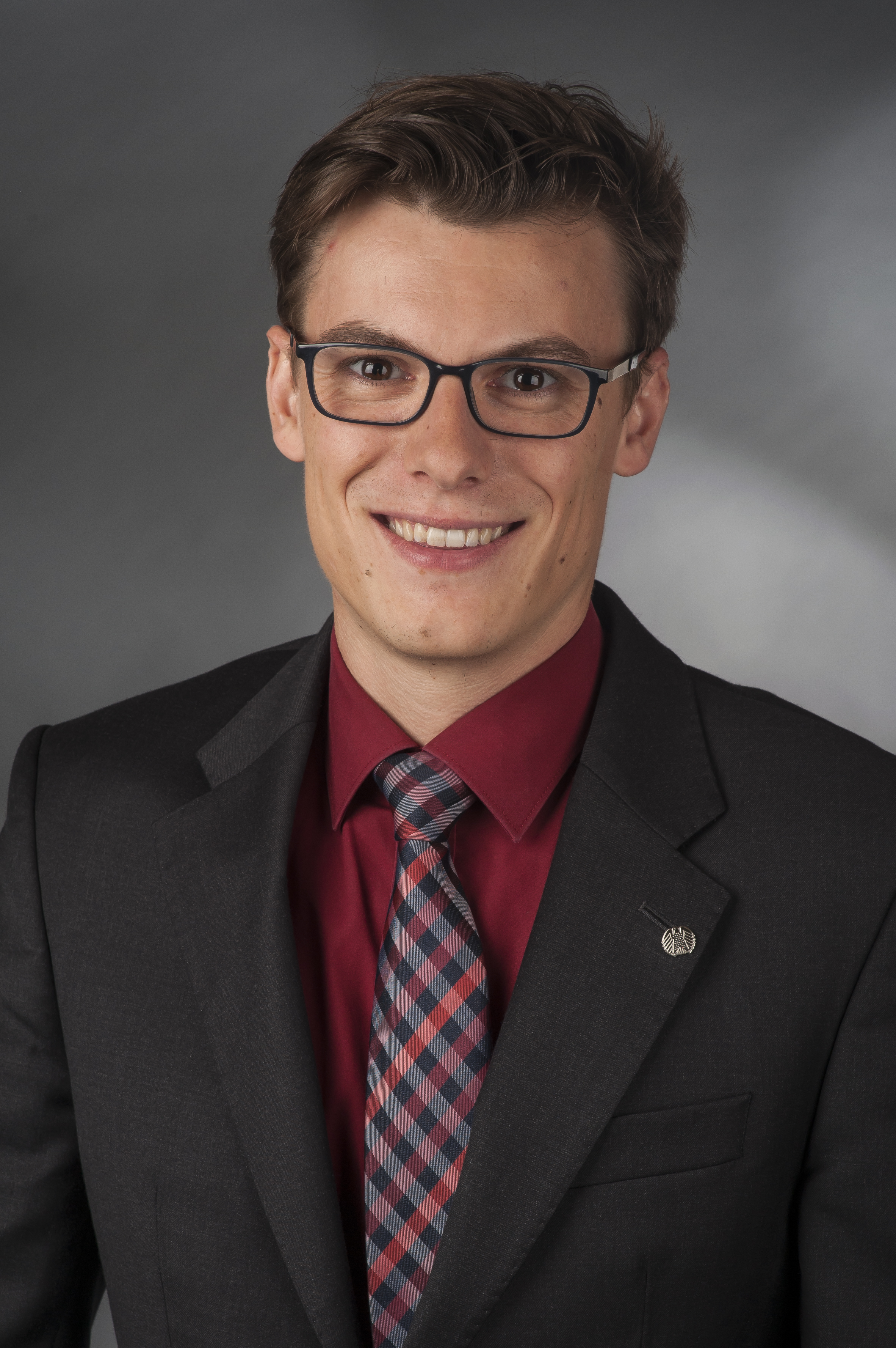 Kai Whittaker (* 10. April 1985 in Baden-Baden) ist ein deutscher Politiker (CDU).